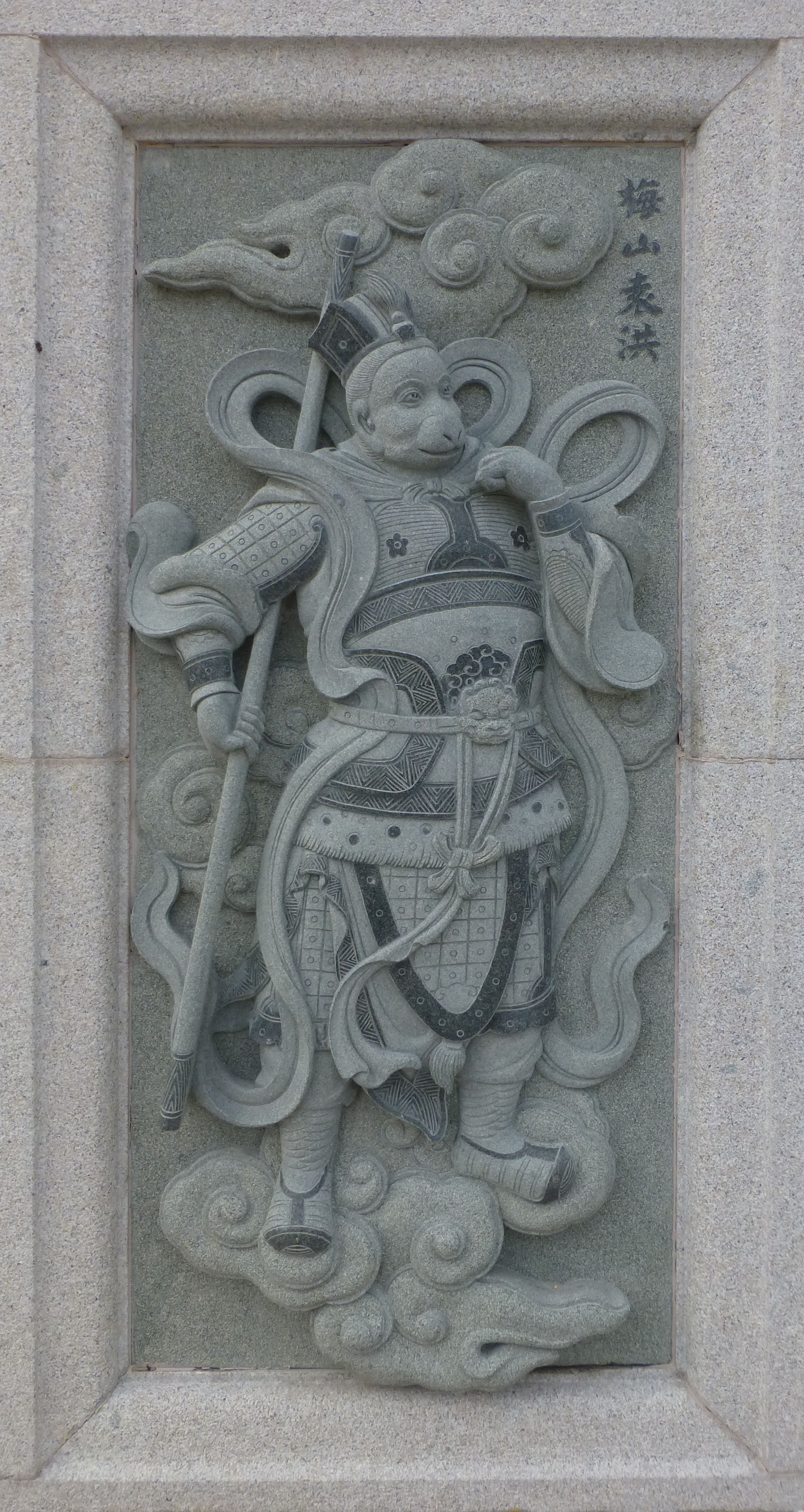 041 Mei shan yuan hong, Investiture of the Gods at Ping Sien Si, Pasir Panjang, Perak, Malaysia Photograph from the Ping Sien Si Temple in Perak, Malaysia taken by Anandajoti.